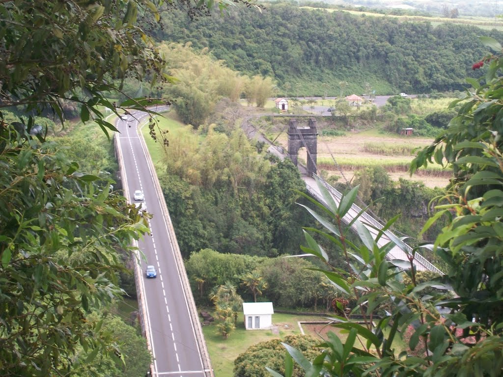 les deux ponts de la rivière de l'est